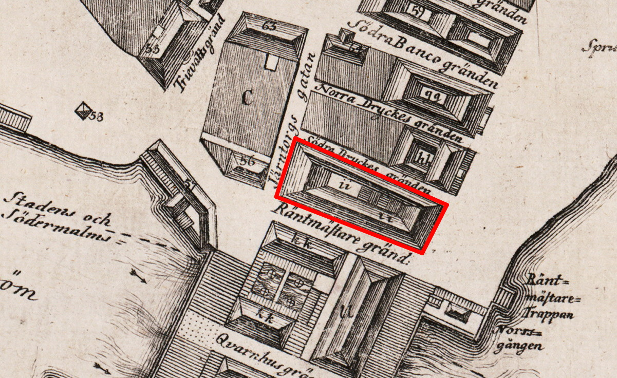 Karta över södra delen av Gamla stan med Räntmästarhuset